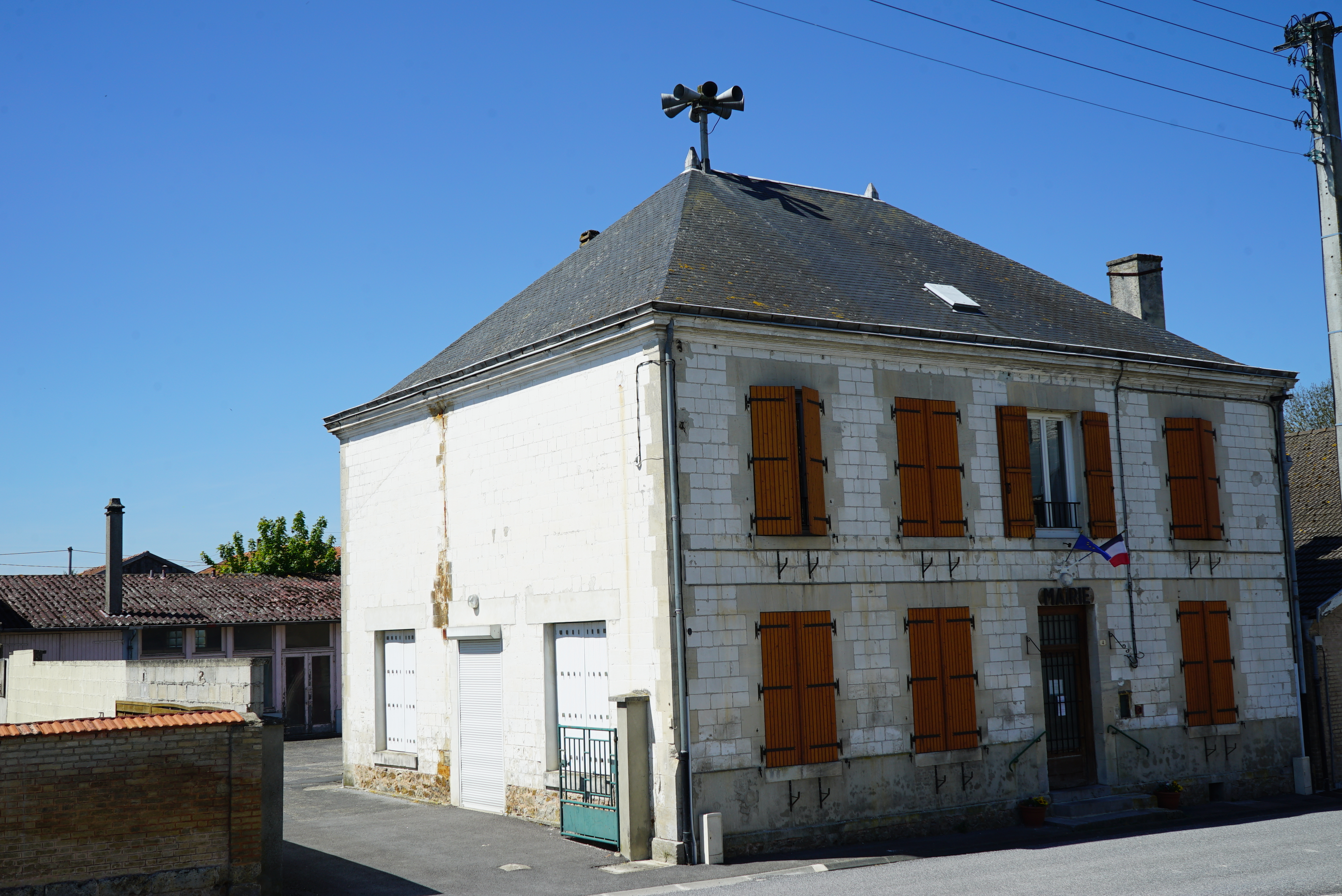 à Somme Suippe